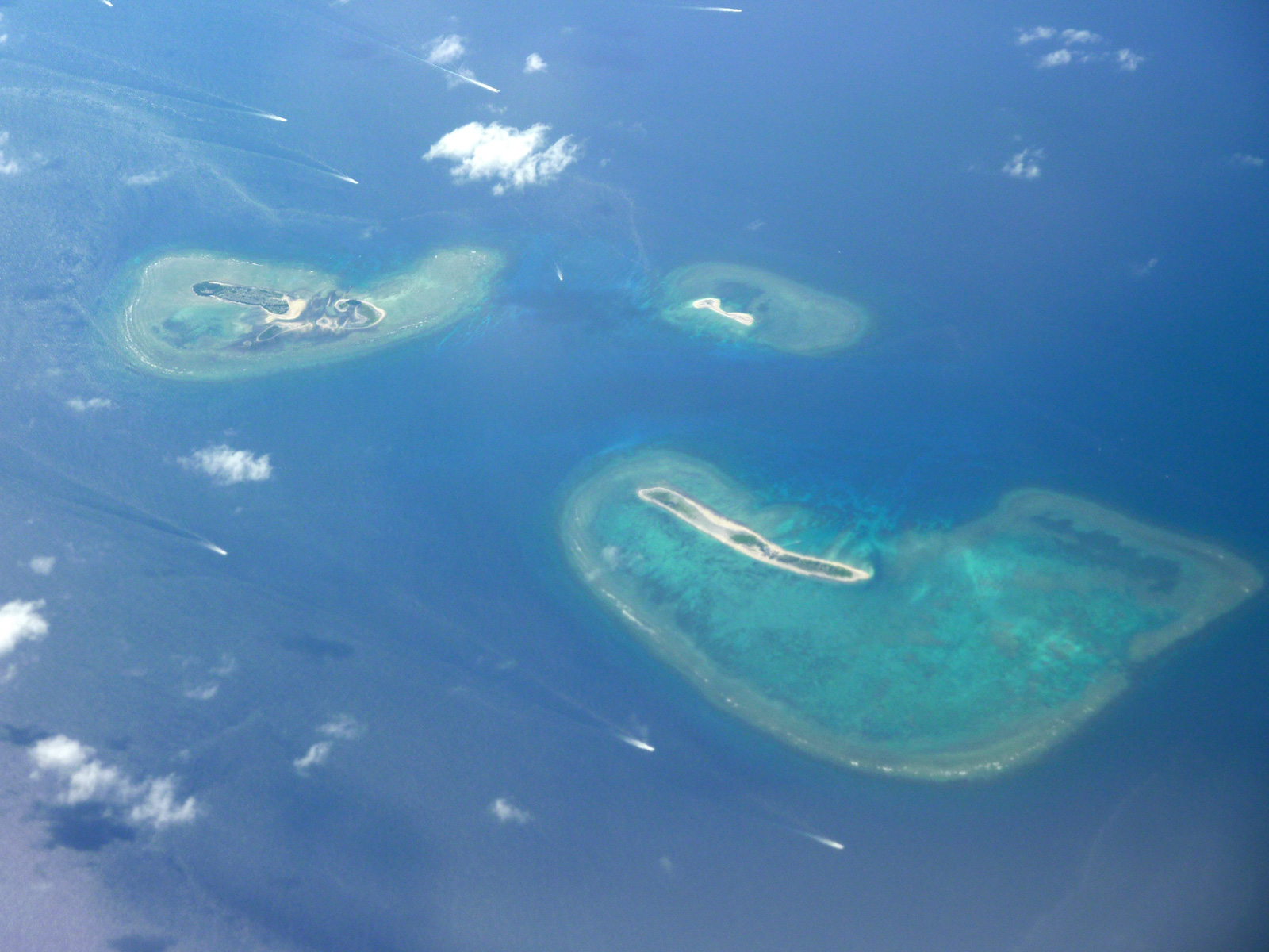 慶伊瀬島（沖縄県）